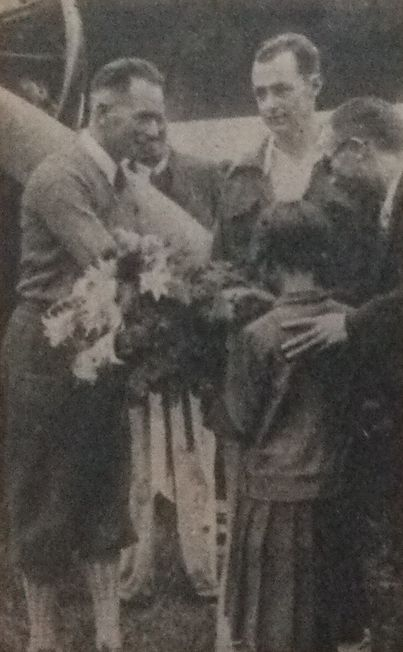 クライド・パングボーンとヒュー・ハーンドン